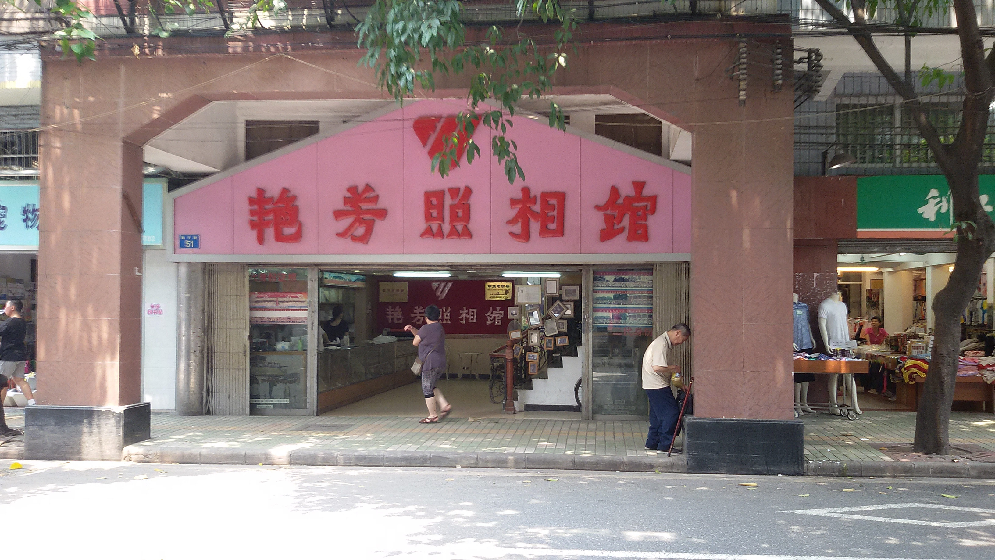 粵語: 艷芳相舖